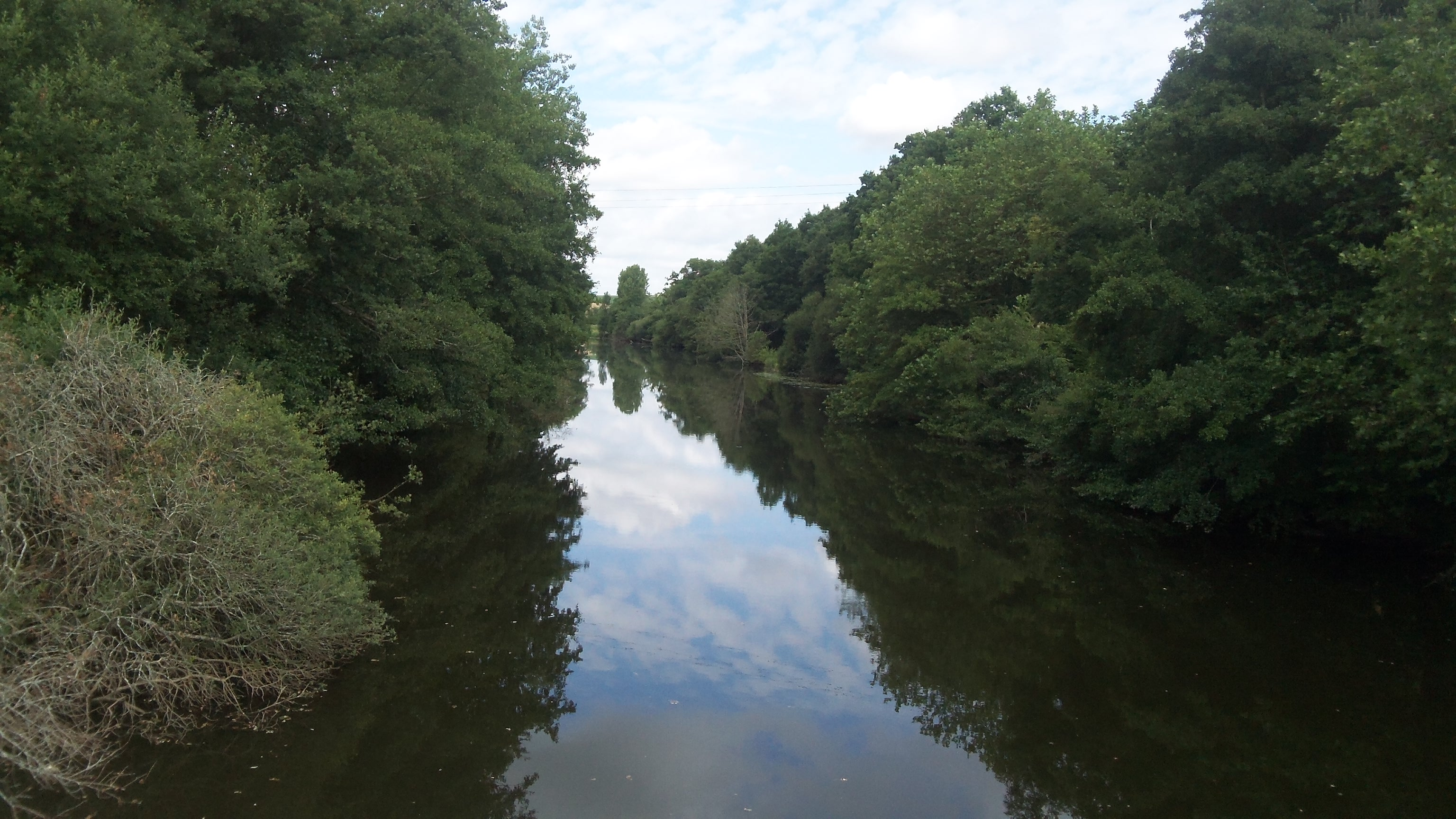 Vue du Ninian à partir du pont au lieu-dit La Chatouillette, sur la commune de Guillac.